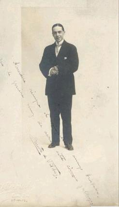 Ernesto Vilces, actor español